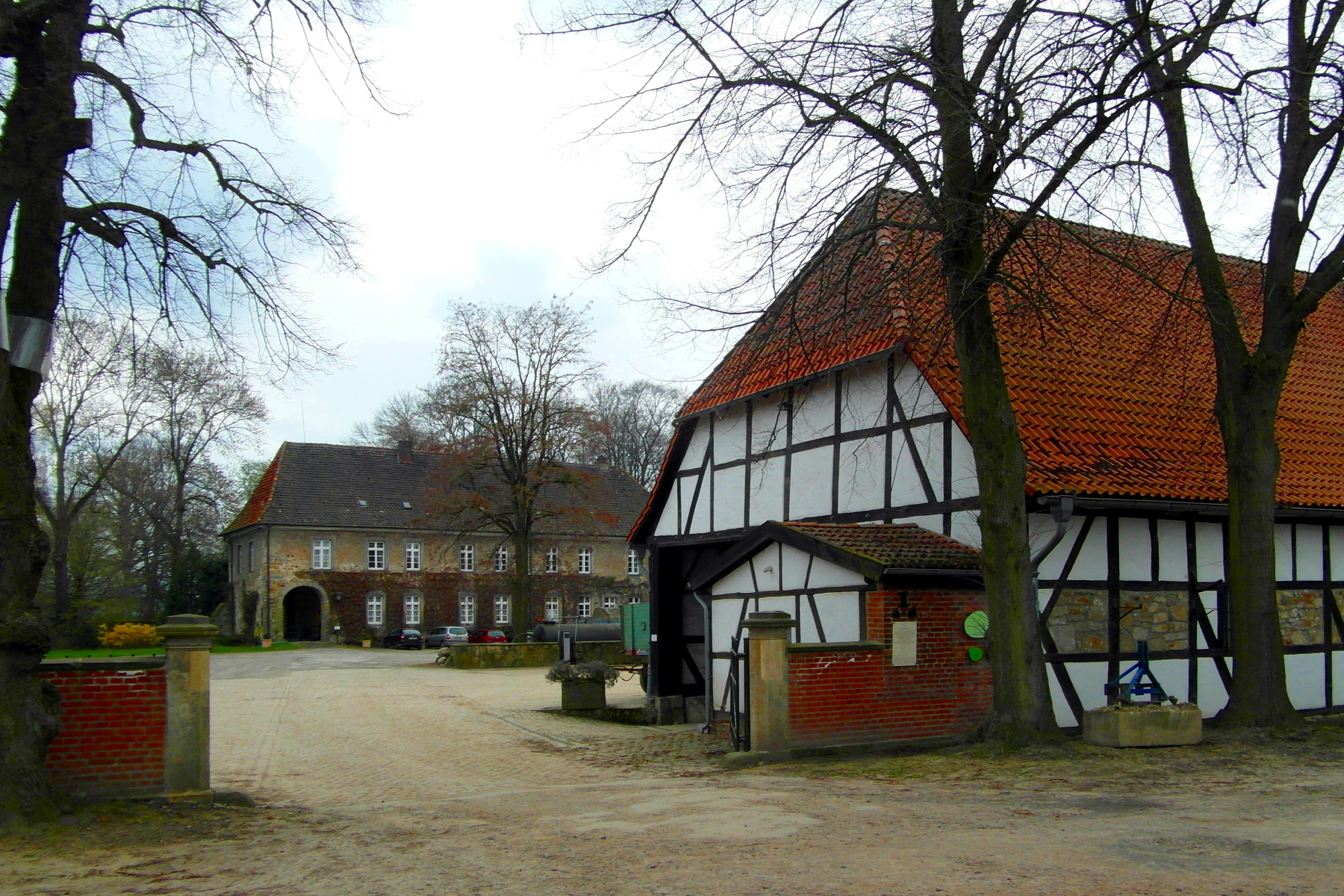 Haupthaus und Zehntscheune des Gutes Dunau. Beide vom Anfang des 18. Jahrhunderts